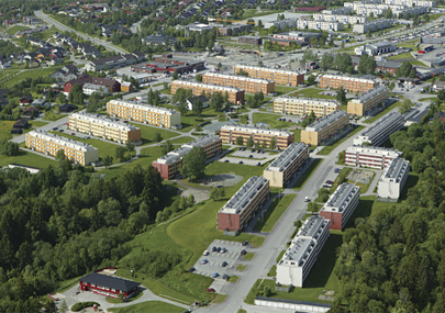 Hallset Fra Luften